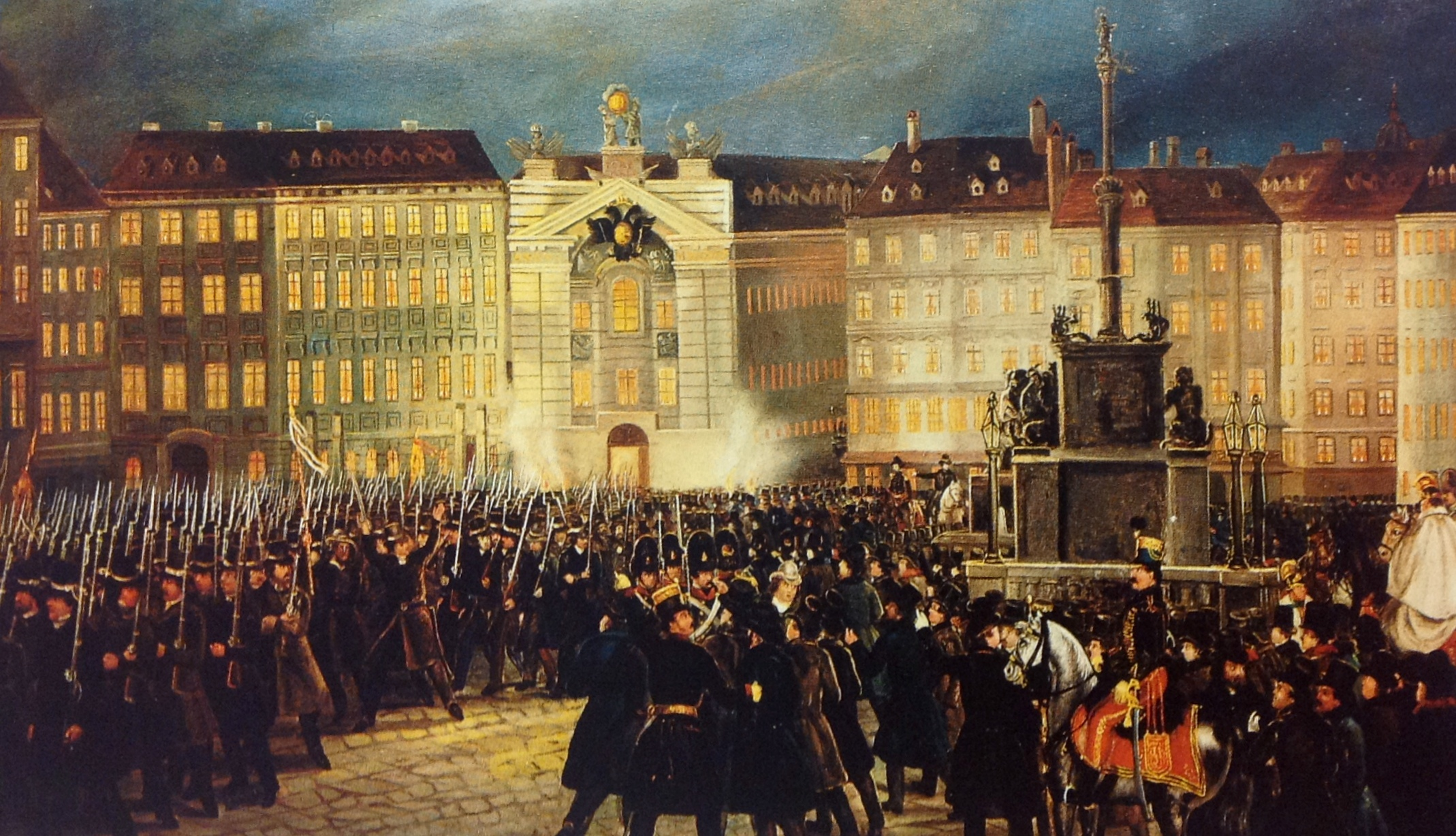 Revolution in Wien, März 1848.